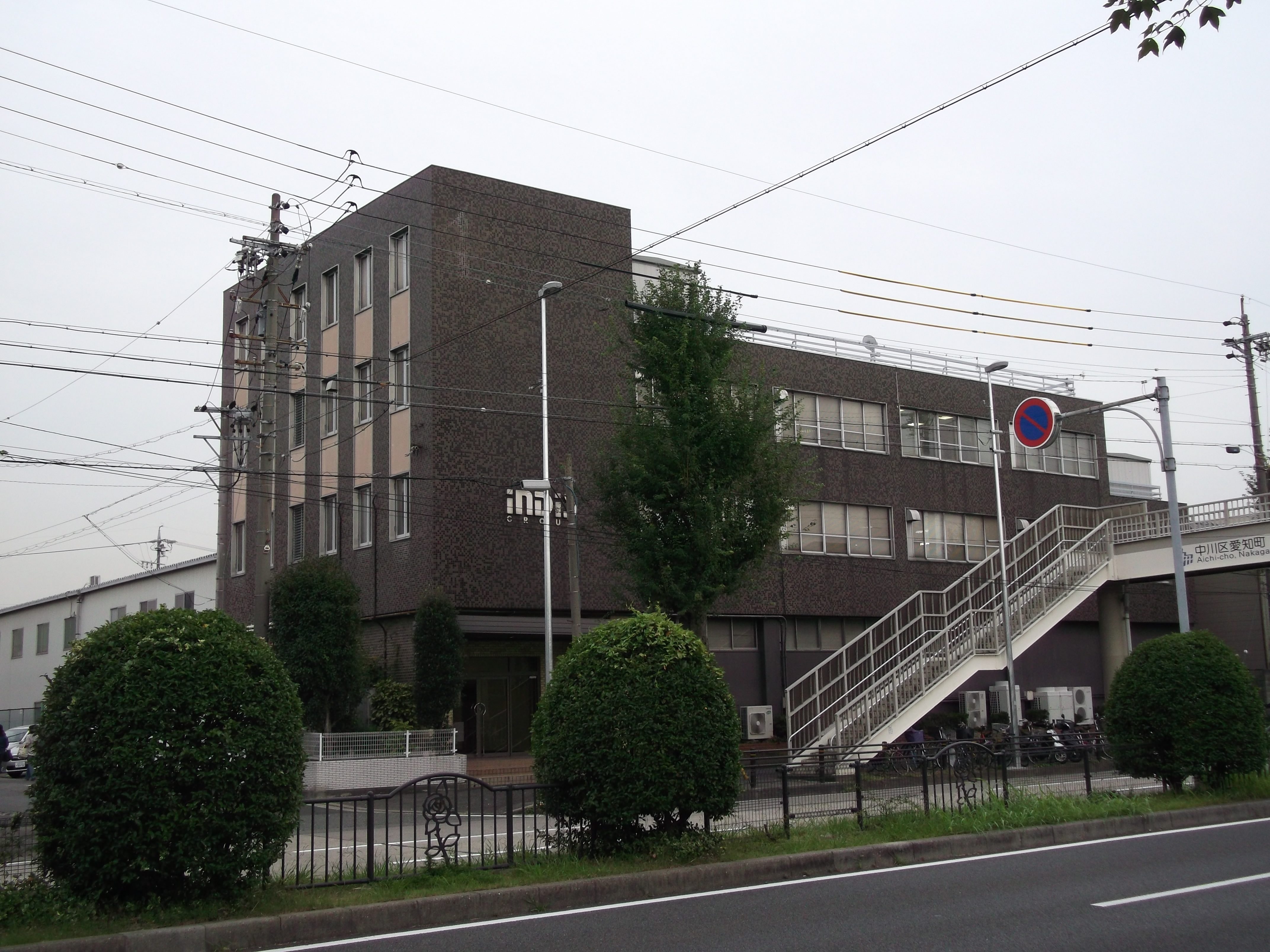 名古屋市中川区のシーエスロジネット本社を西側公道北側より撮影